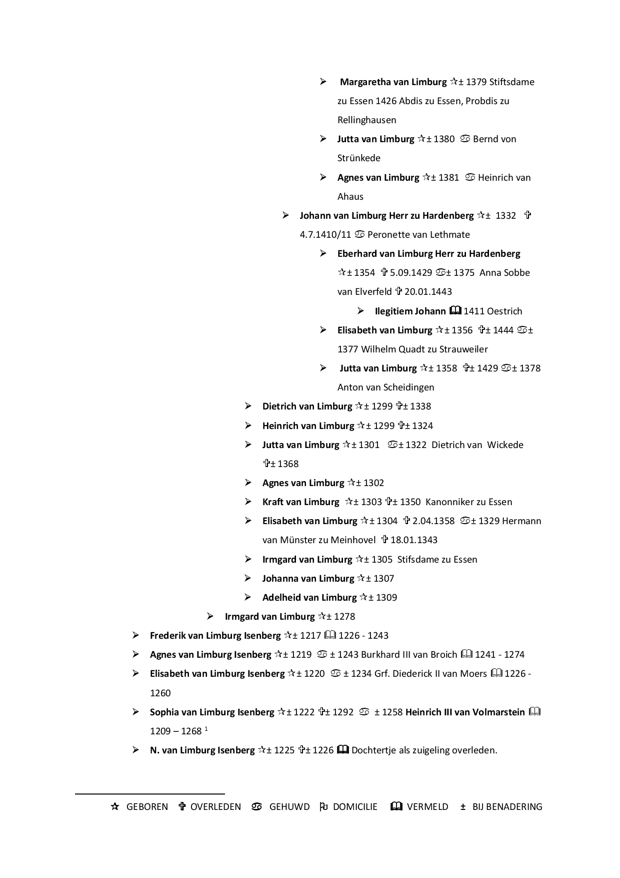 Volledige stamboom van de Graven van Limburg Hohenlimburg & Broich, getoets aan oorspronkelijke bronnen.Uit "Graven van Limburg" ISBN 978-94-92185-59-4